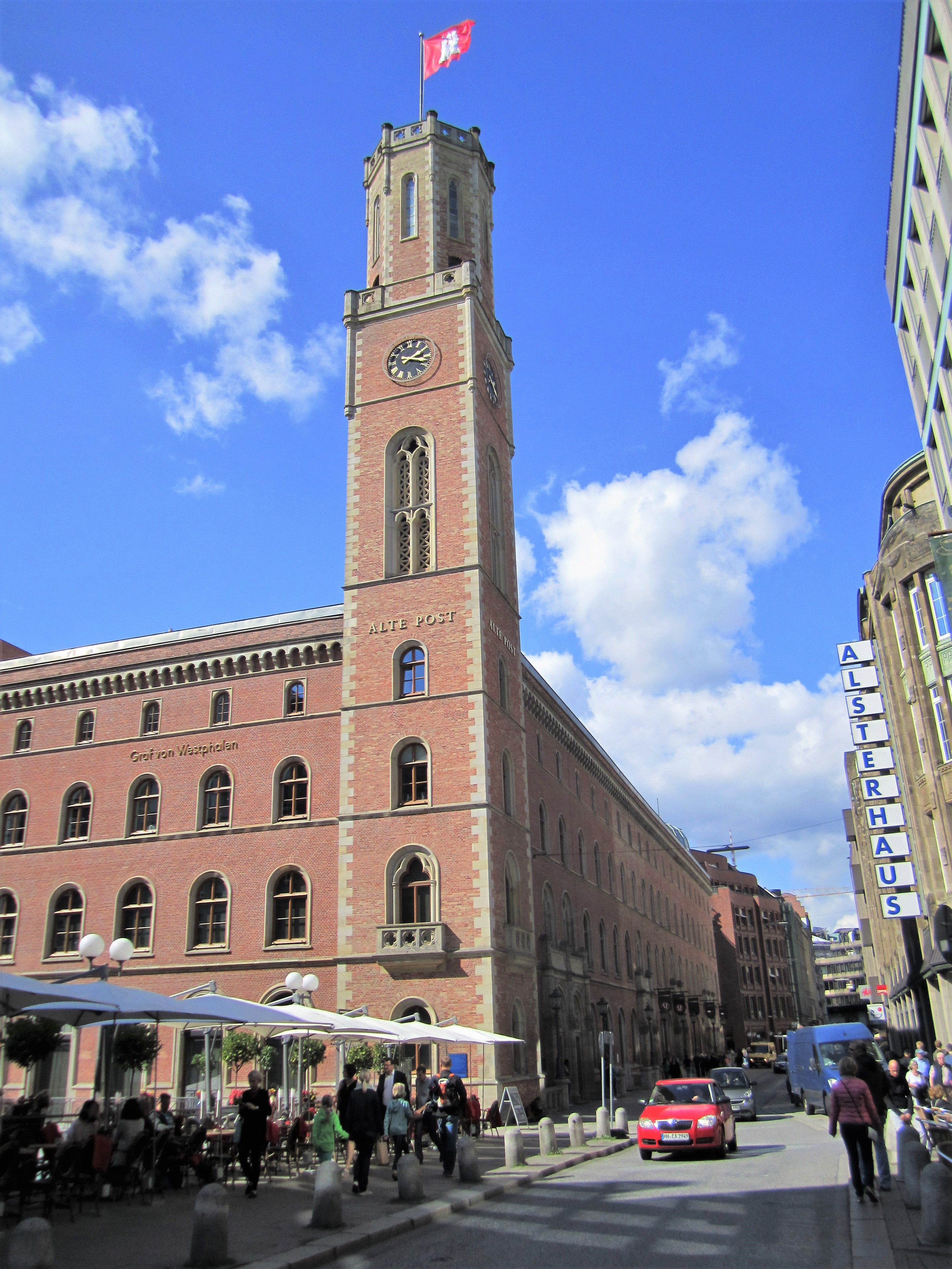 Denkmalgeschützte Alte Post in der Hamburger Neustadt, Poststraße; erbaut 1847.